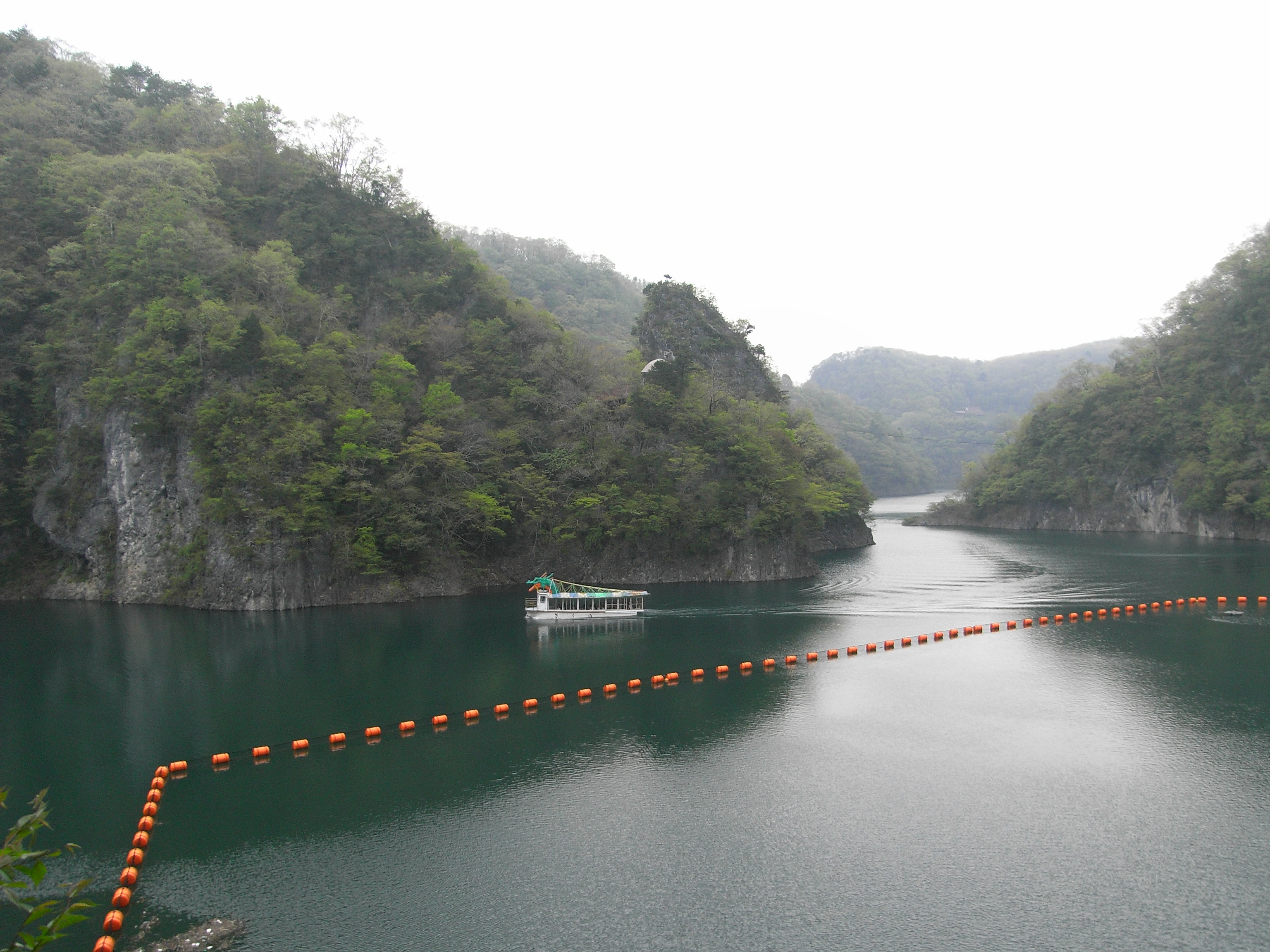 Lake